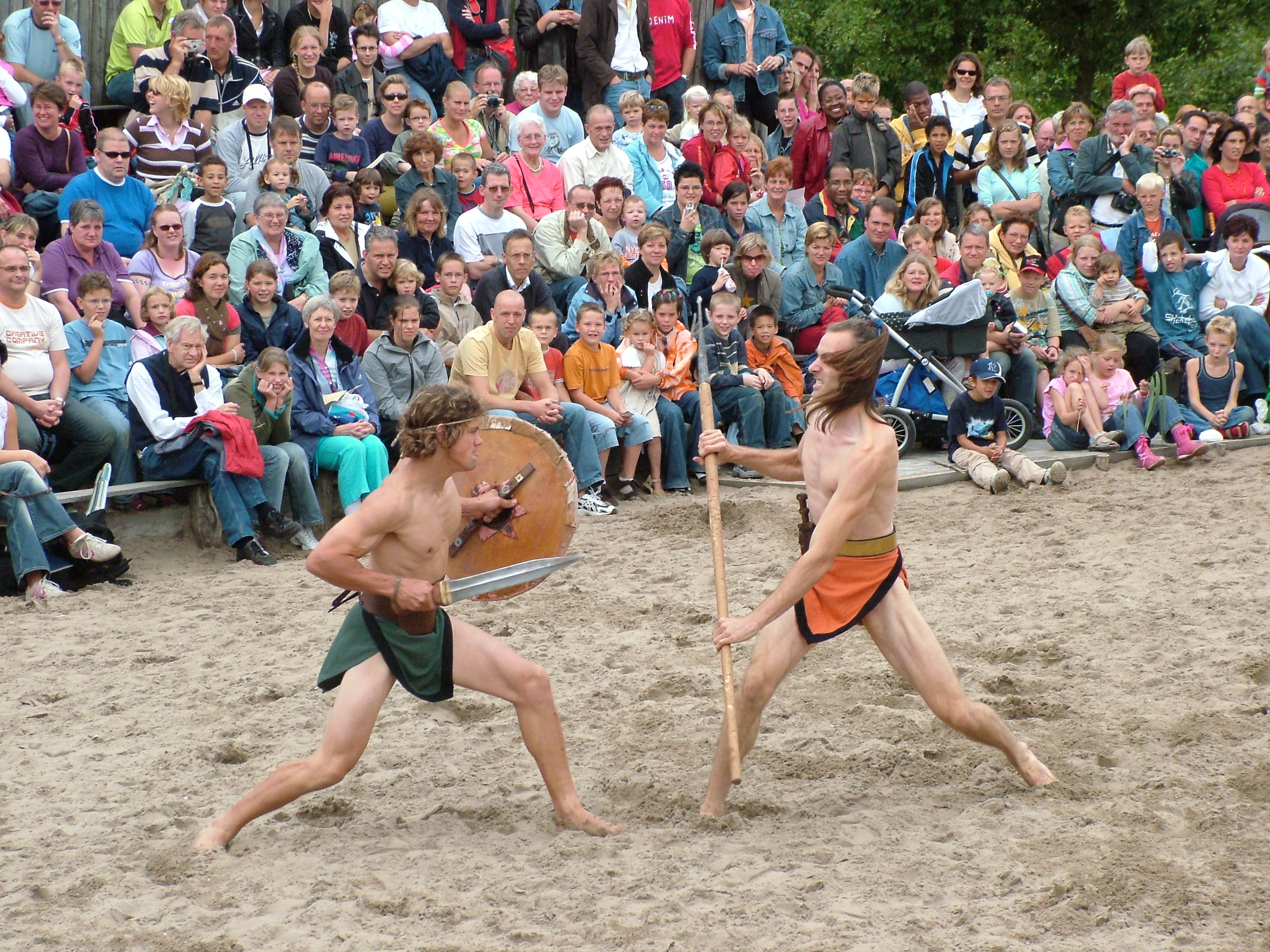 Archeon, gladiatoren in gevecht